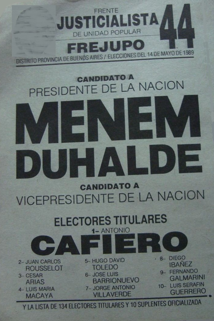 Boleta electoral para la fórmula Carlos Menem - Eduardo Duhalde perteneciente a las elecciones presidenciales de Argentina de 1989